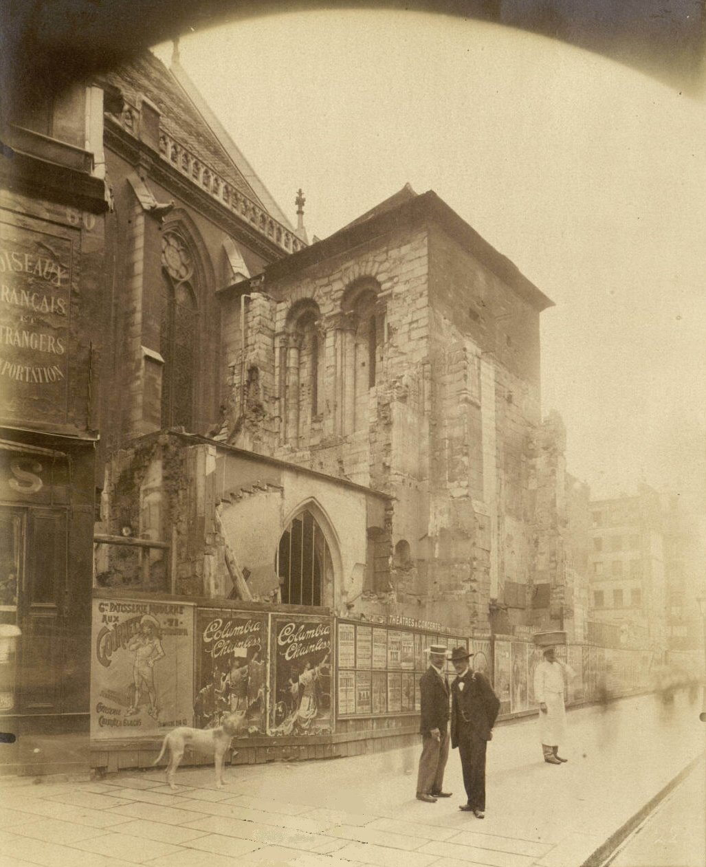 Le clocher de l'église avant la restauration en 1913.